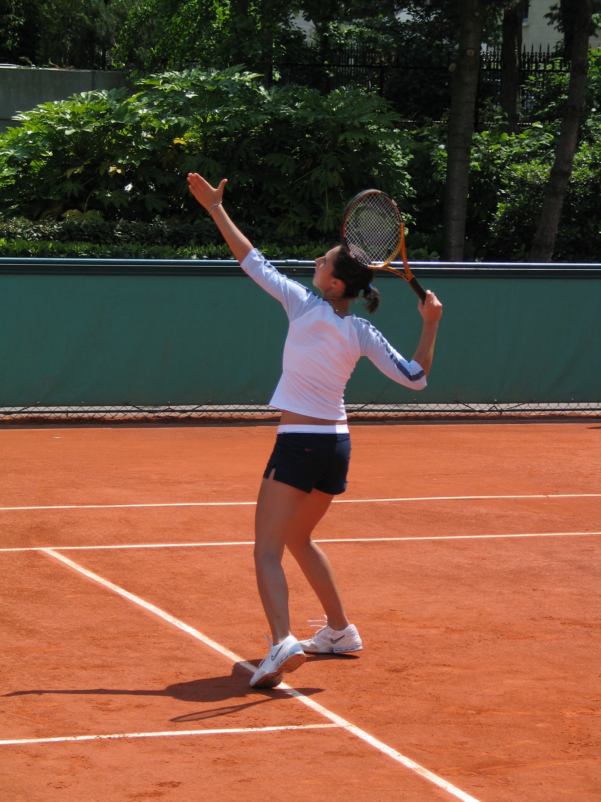 voorbereiding voor de smash